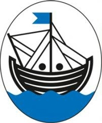 Ruhnu valla vapp